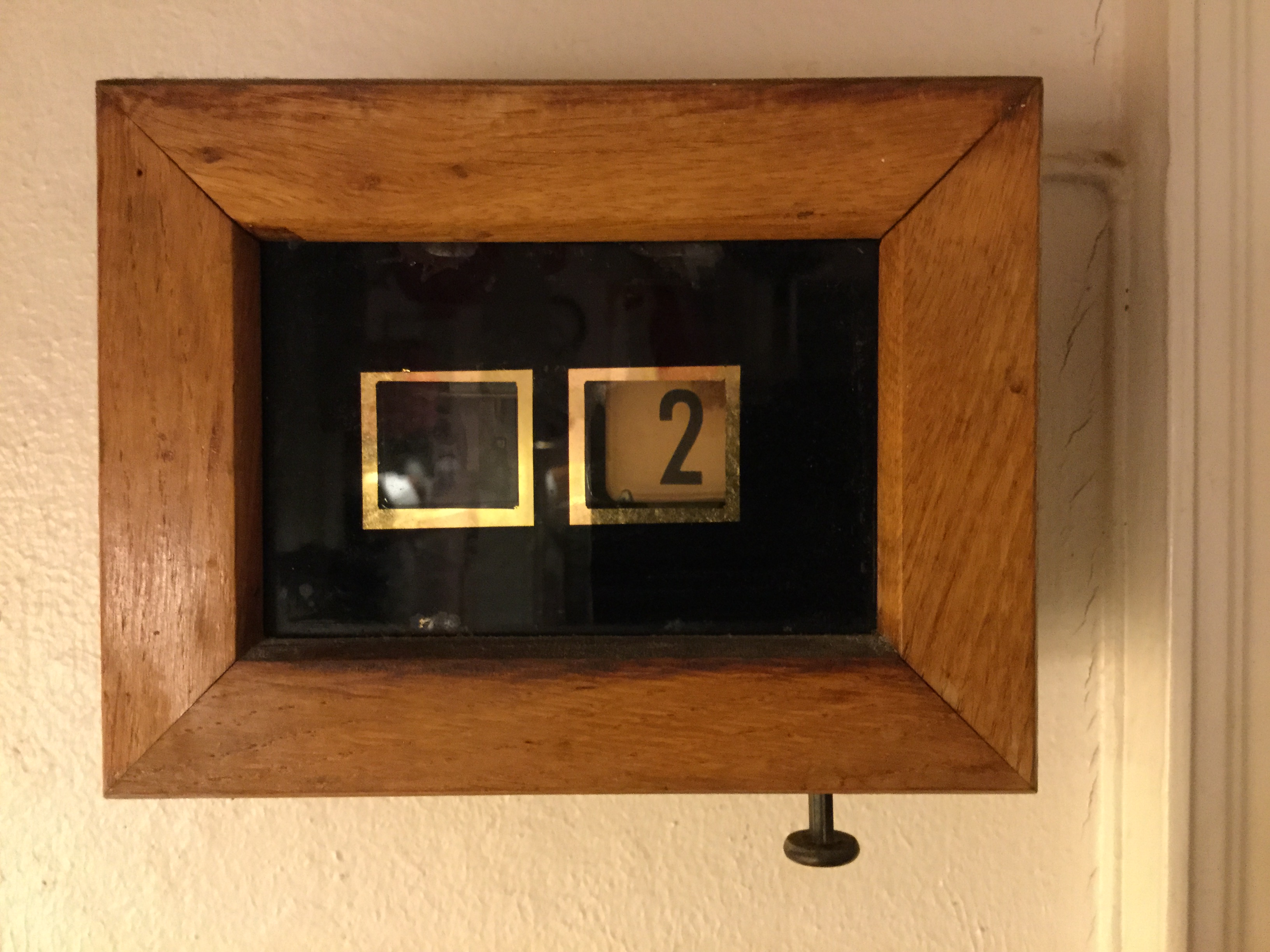 Ringklocka i köket i en trerumslägenhet på Kungsholmen i Stockholm, i ett flerbostadshus byggt 1931-1932, ritat av arkitekten Björn Hedvall. En siffra faller ner och visar för tjänstefolket varifrån som ringsignalen kommer - i detta fall antingen från ytterdörren eller från sovrummet.